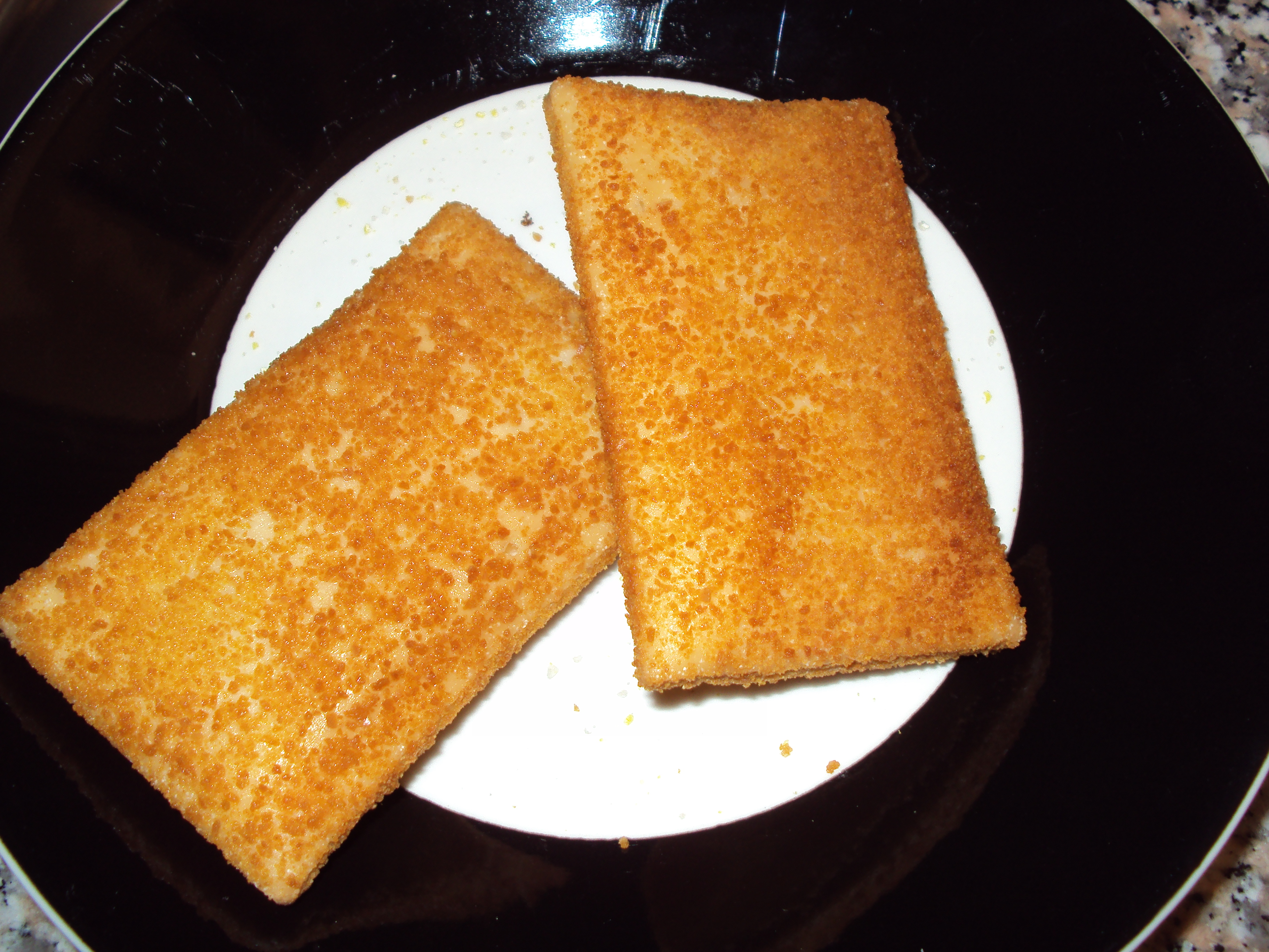 2 kaassouffle's op een bord.